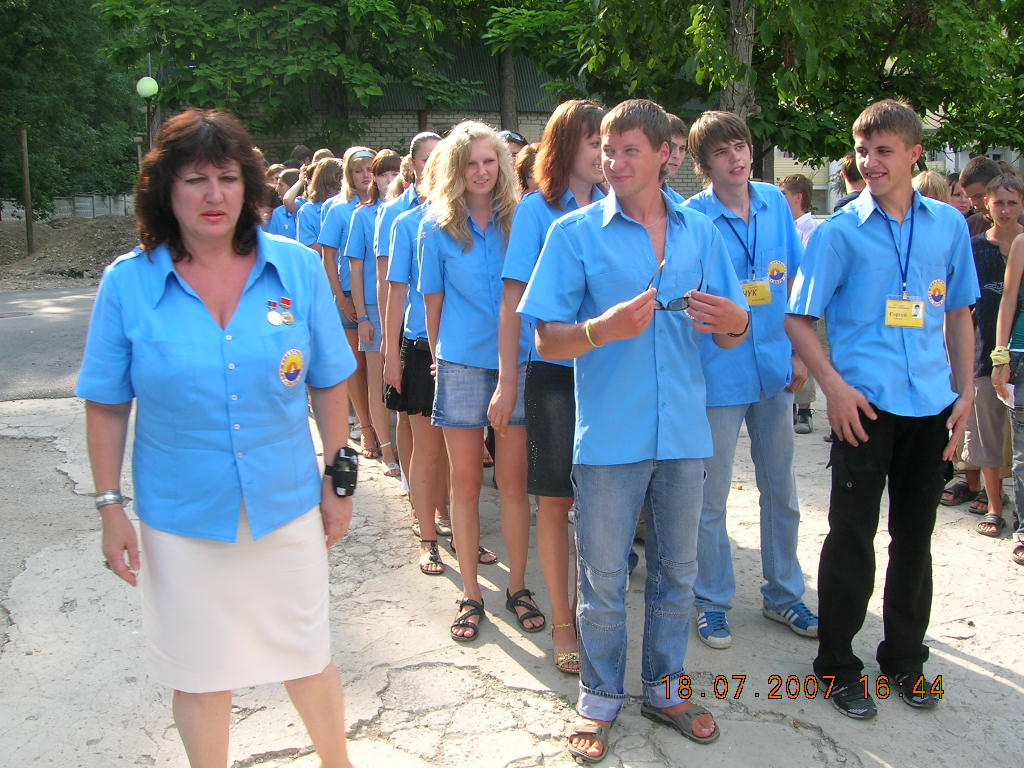 Вожатые педагогического отряда "Пламенный" (г. Пенза) с руководителем к.п.н Кудряшовой И.А. на марше